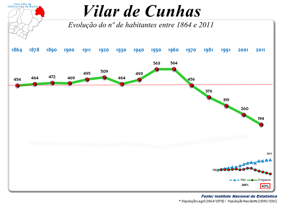 Censos 1864/2011